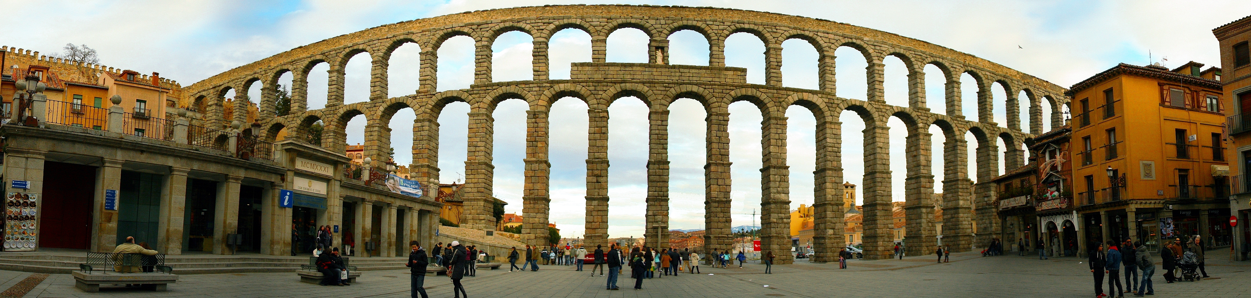 Panorámica del Acueducto de Segovia.